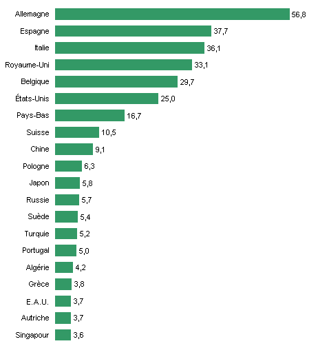 (leer el titulo)